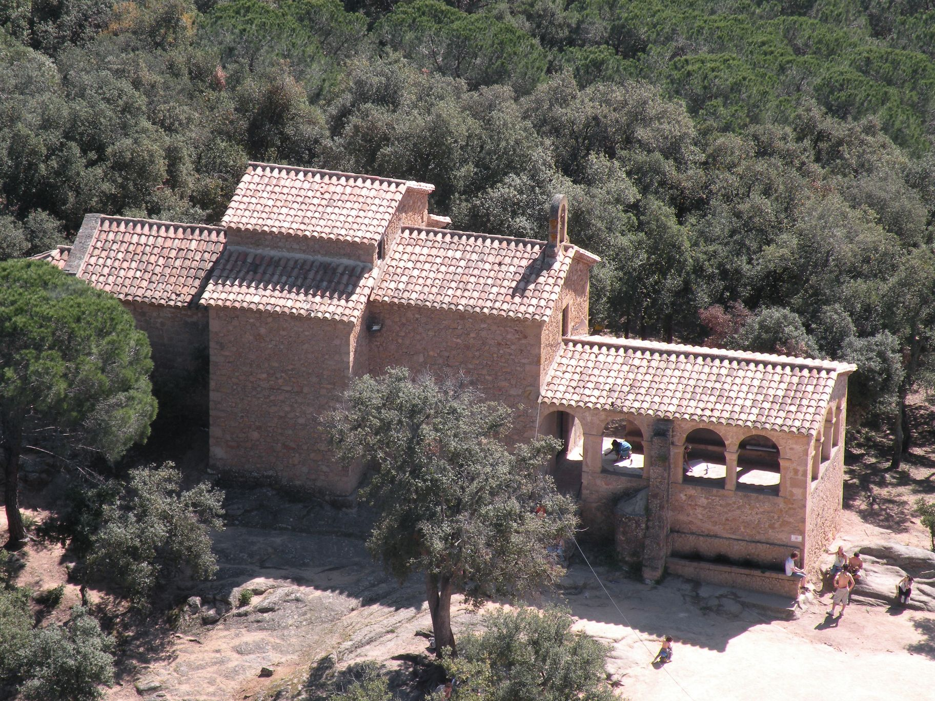 Mare de Déu de Farners des de dalt del Castell de Farners